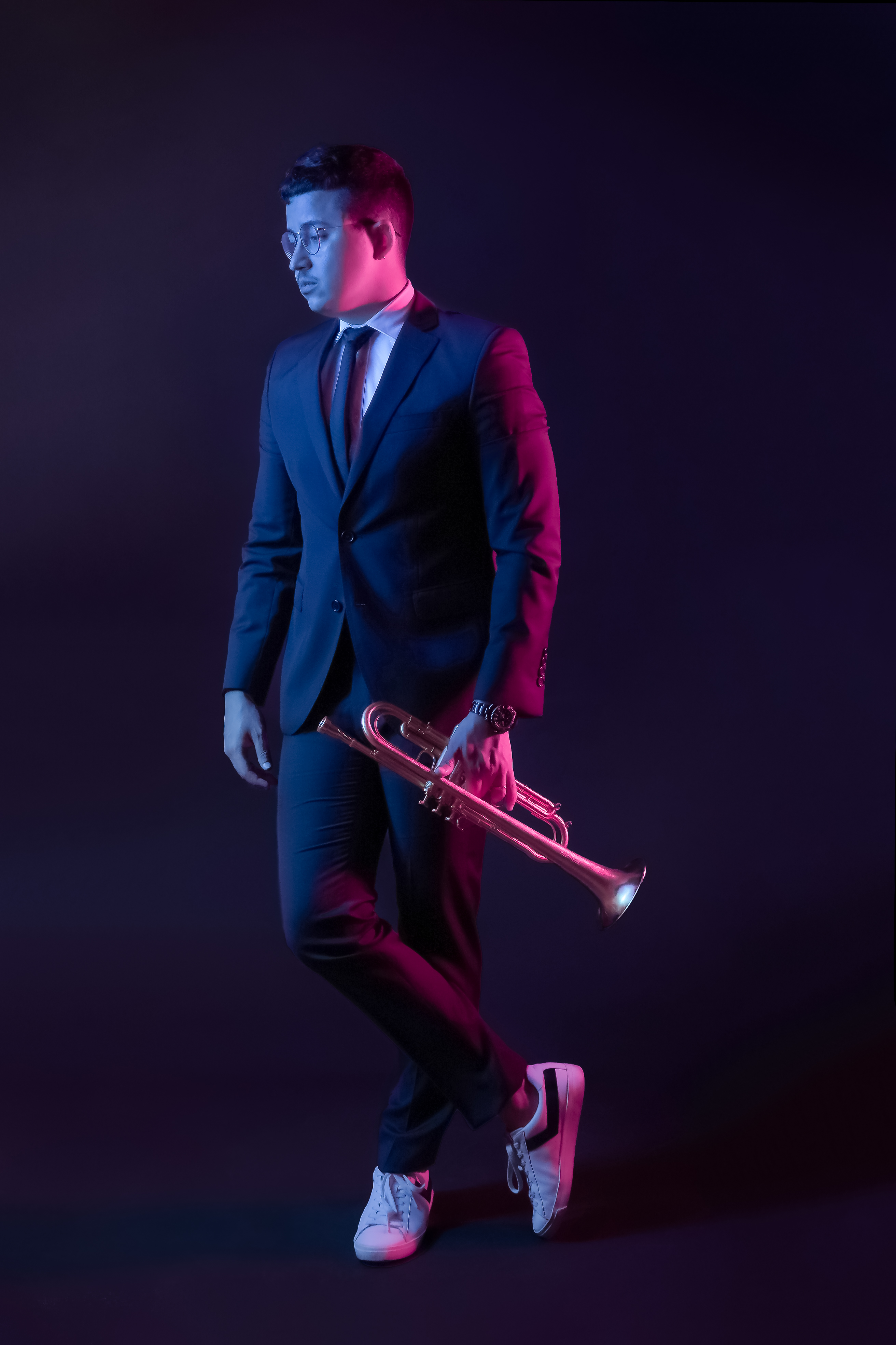 Gileno Santana com o seu modelo LU5A, desenhado pela marca austríaca Schagerl.